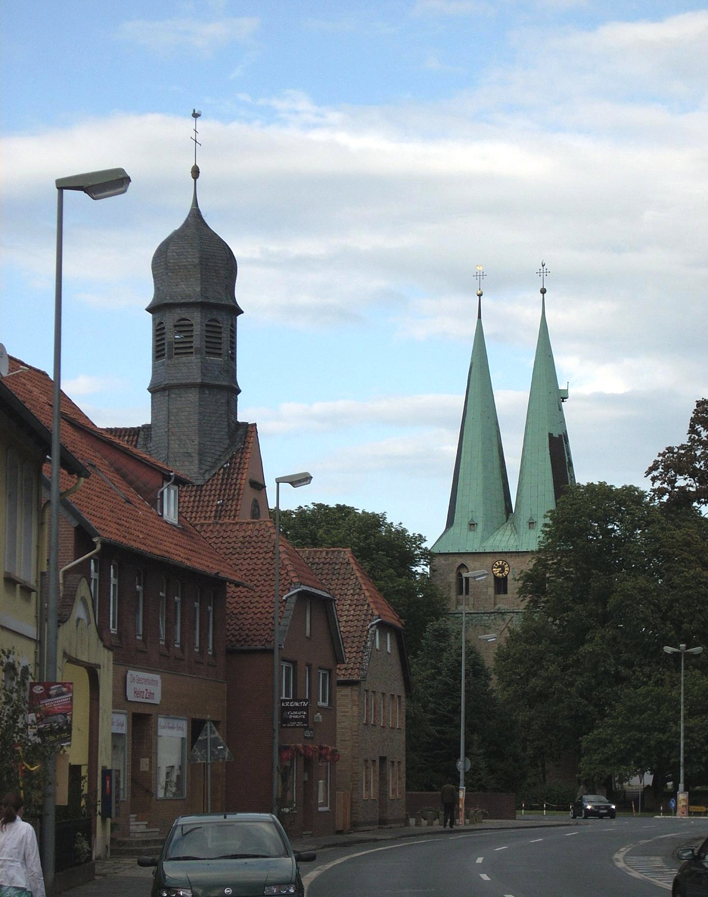 Hohenhameln, Germany